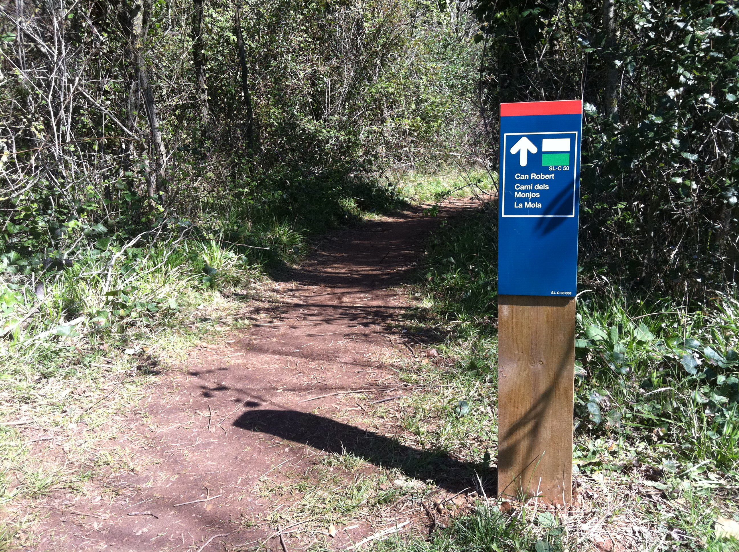 Camí dels Monjos